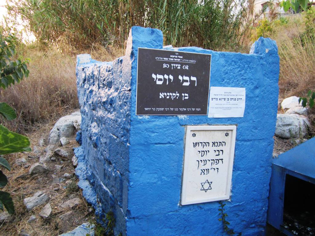 קבר רבי יוסי בן לקוניא וי"א רבי יוסי דמן פקיעין